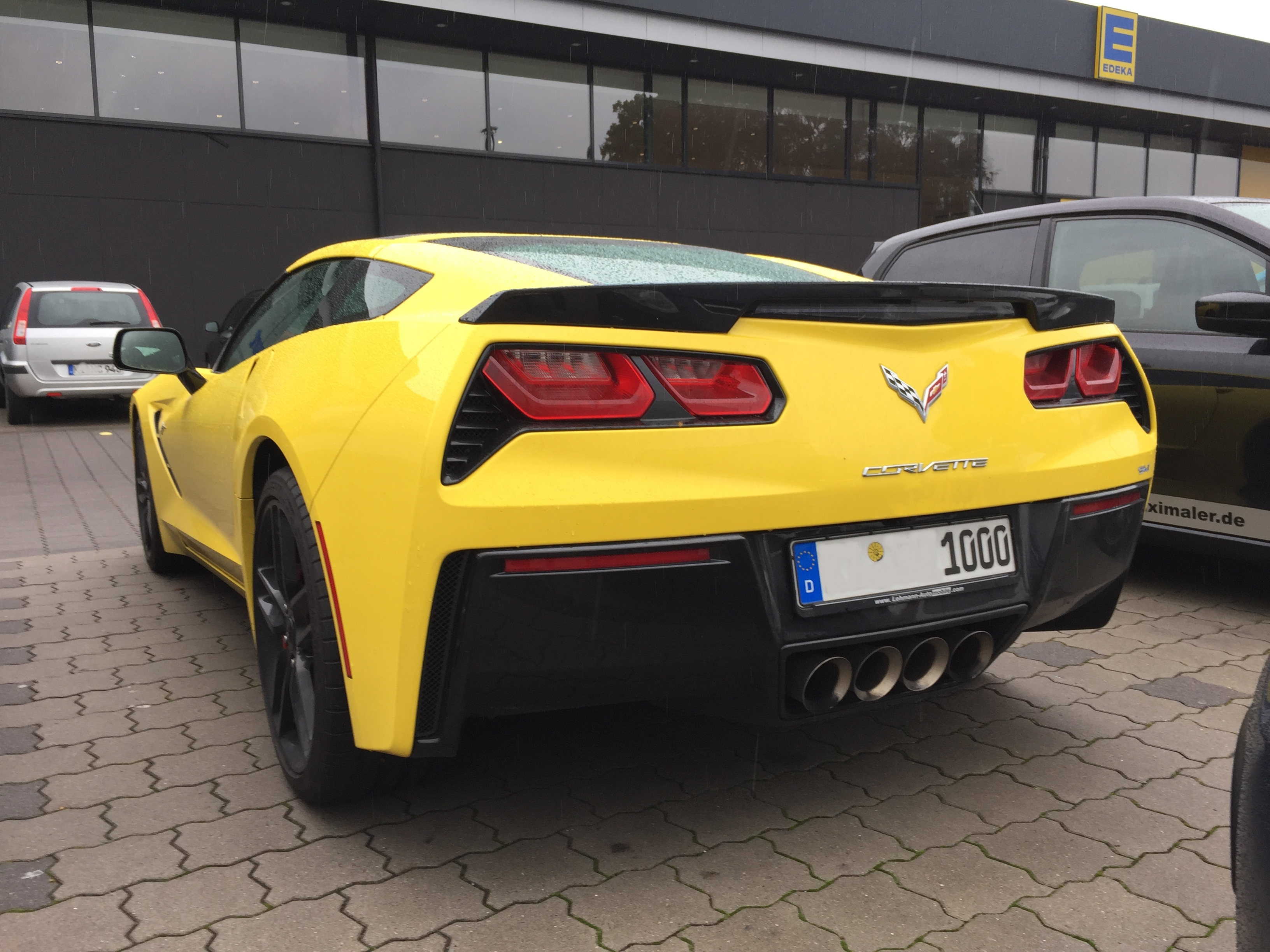 Chevrolet Corvette C7 Heckansicht